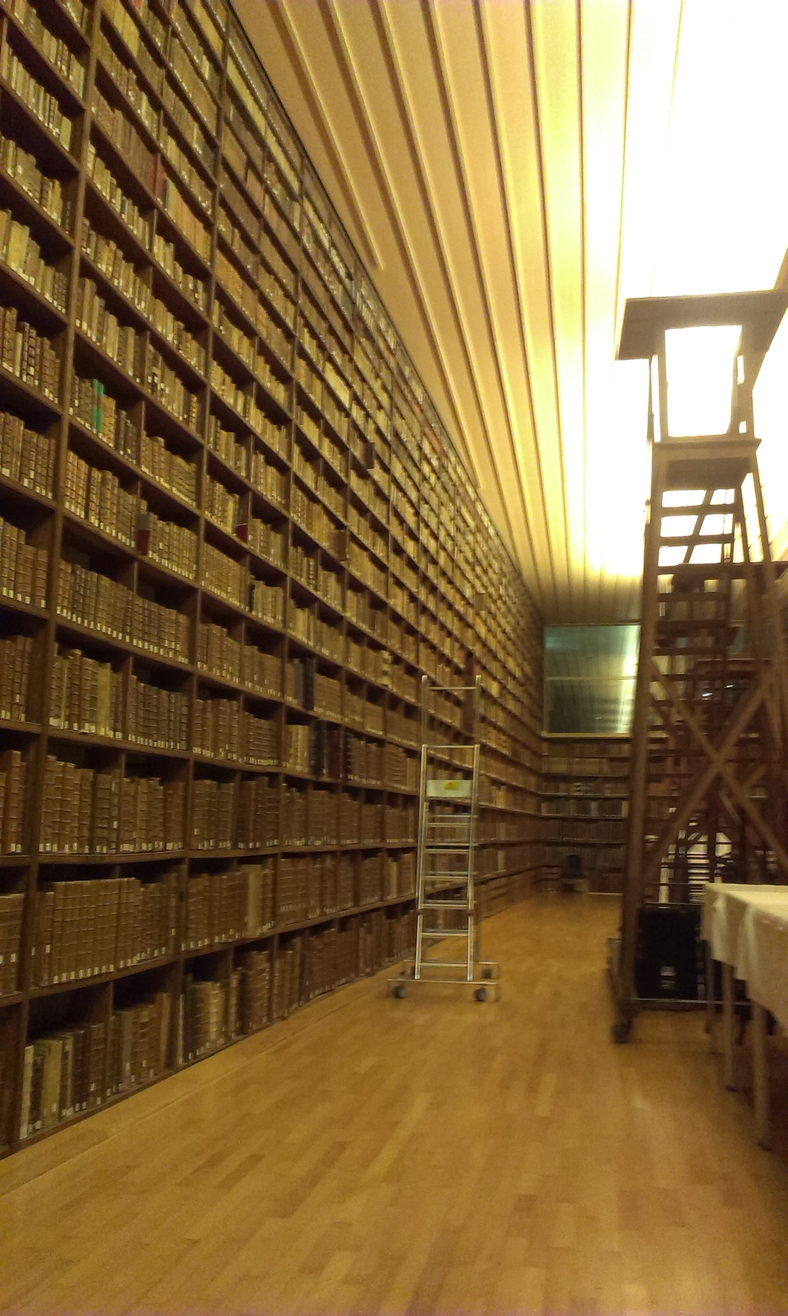 Médiathèque d'agglomération de Troyes - salle des livres anciens